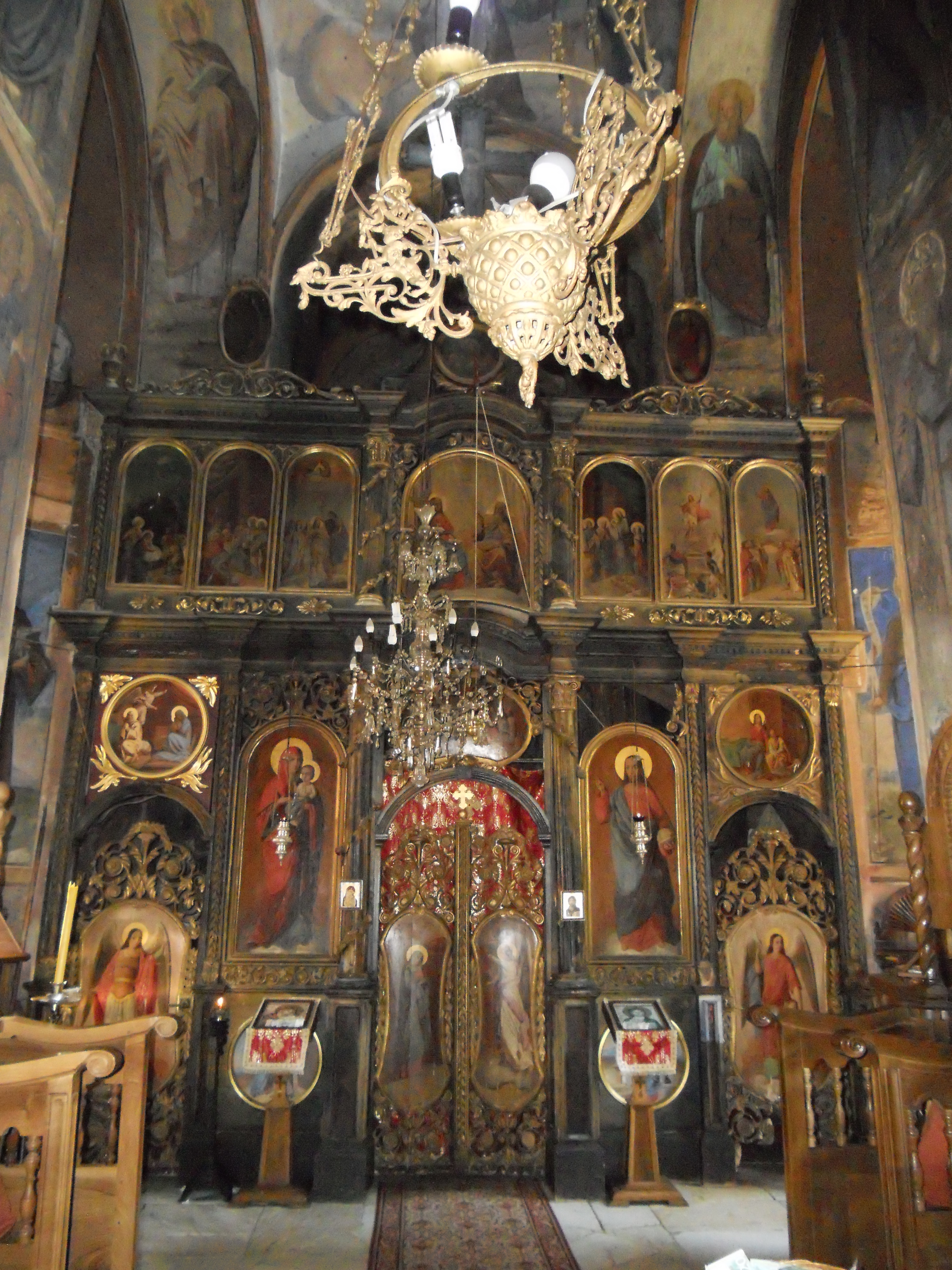 Manastir Kamenac